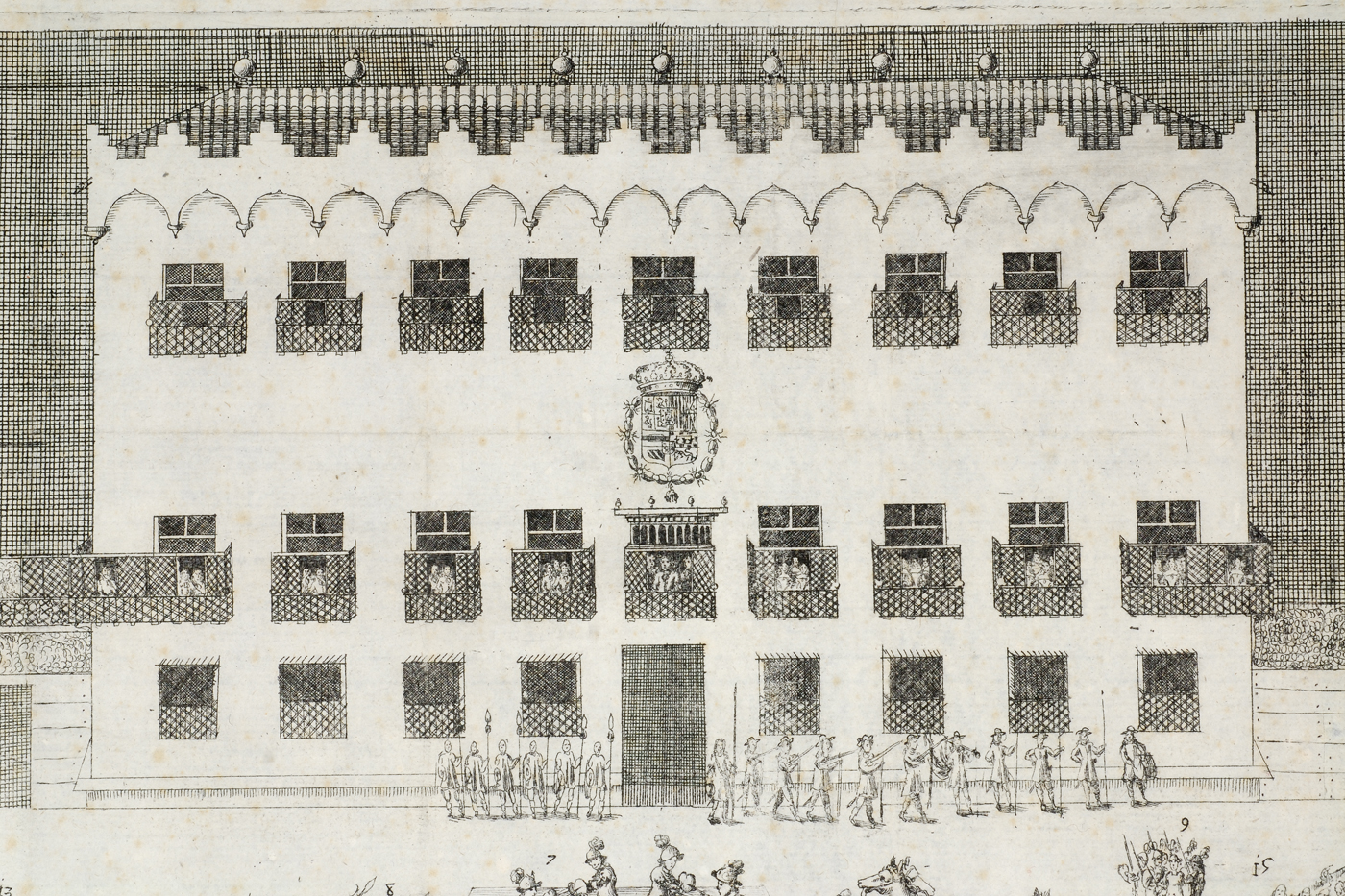 Palau Reial de Barcelona (Hala dels Draps) Francesc Via, gravat, 34 x 44,5 cm, Arxiu Històric de la Ciutat de Barcelona, núm. inv. 17933.